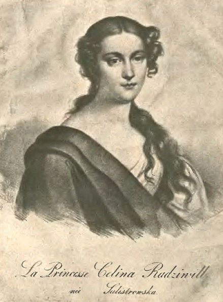 Celina Radziwiłłowa z Sulistrowskich